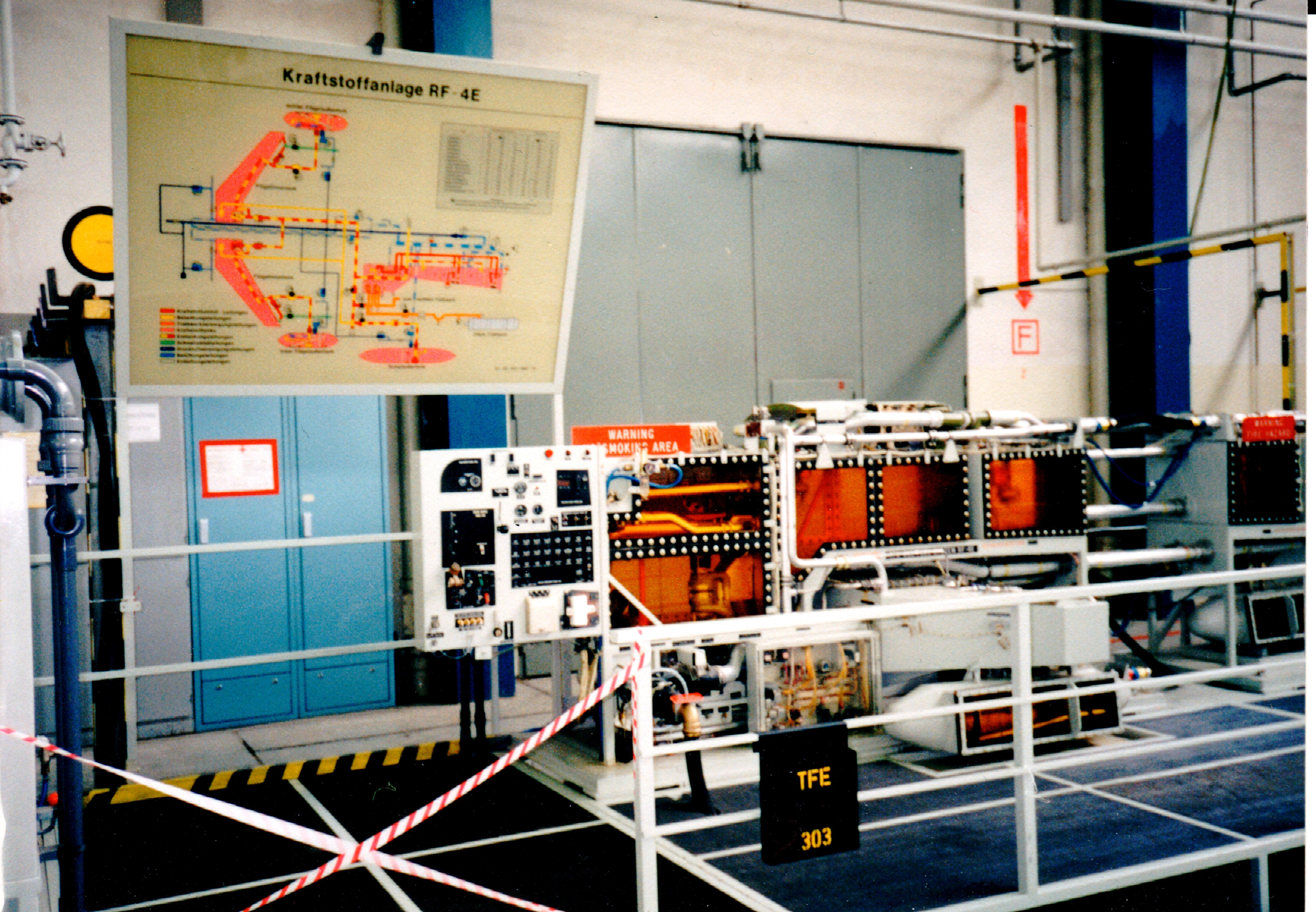 Kraftstofftrainer RF-4E und F-4F Phantom II, in der techn. Schule der Luftwaffe, Kaufbeuren.